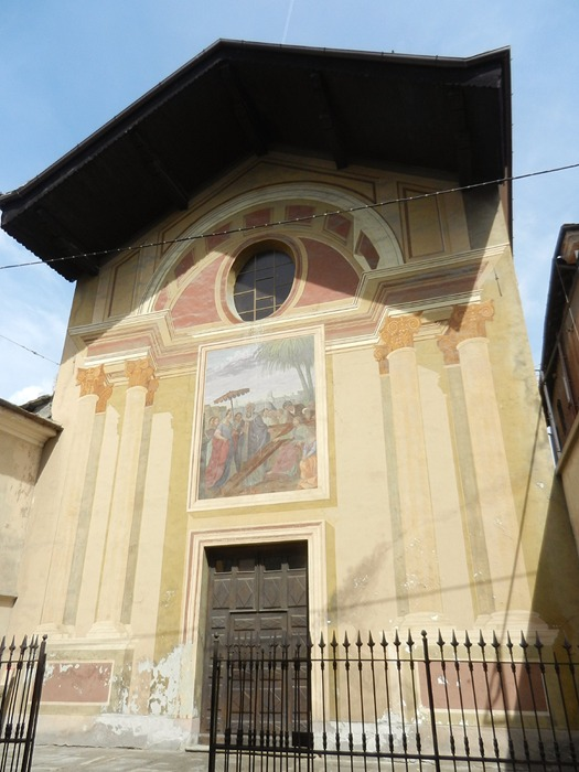 Aosta - Chiesa della S. Croce